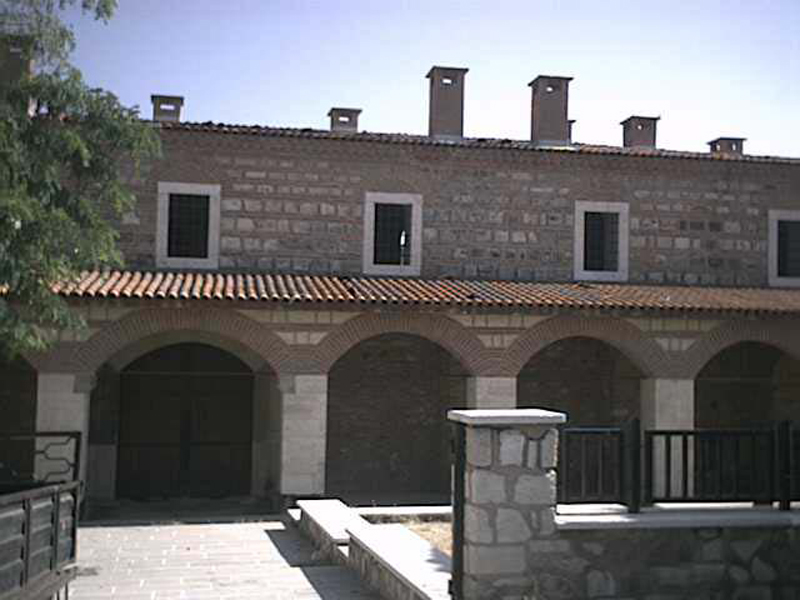 Taşhan Caravanserai in Menemen, Turkey